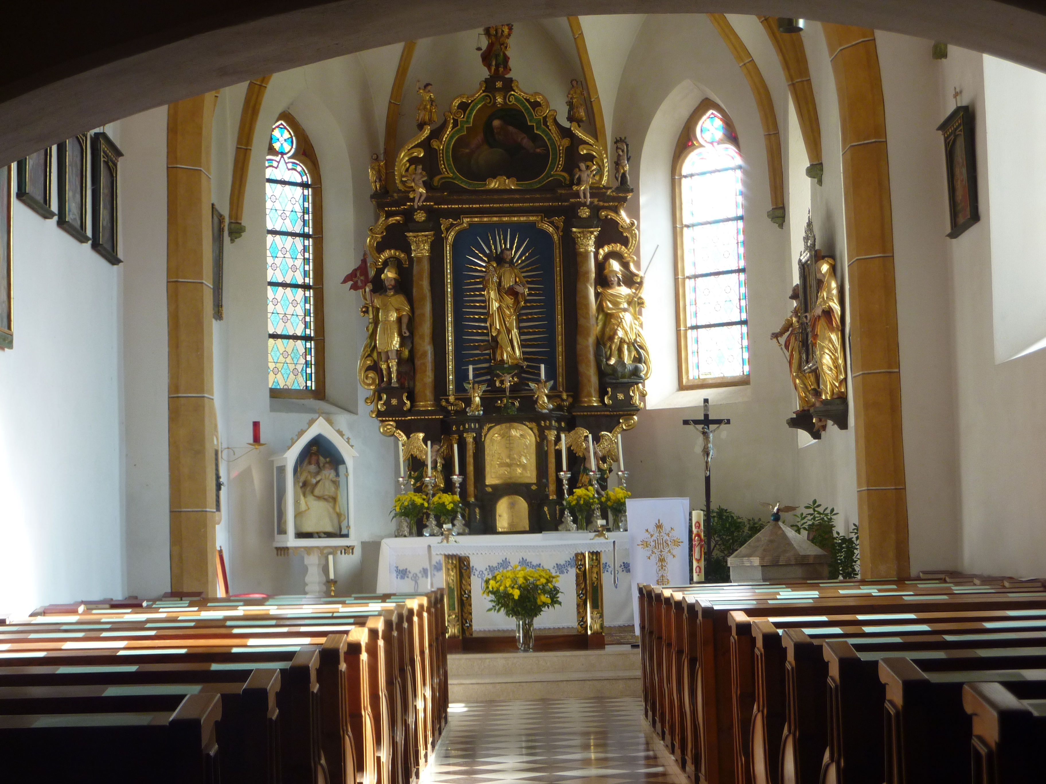 Pfarrkirche hll. Peter und Paul, St. Peter, Reichenfels, Kärnten, Österreich